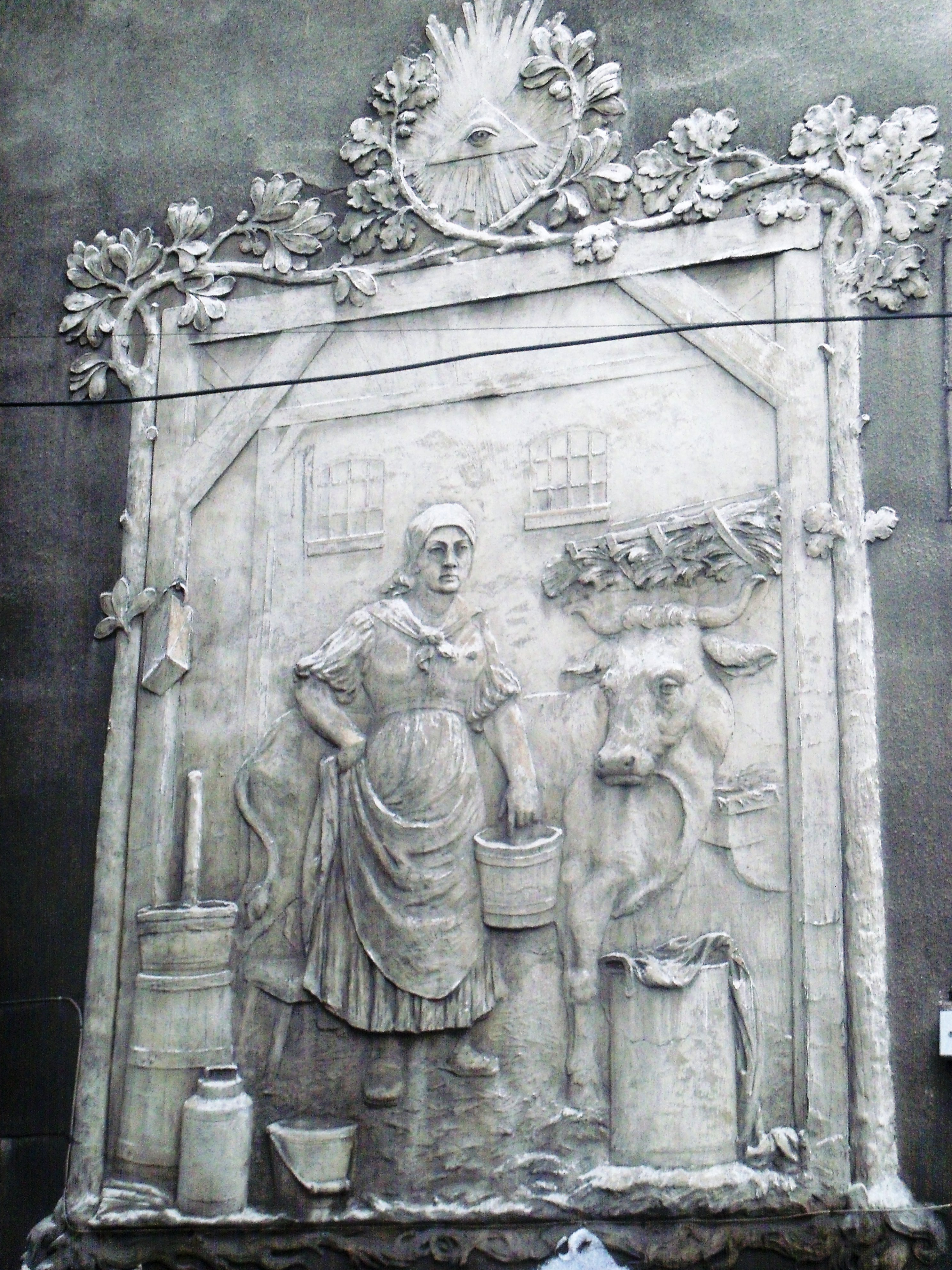 Ulica Józefy Kantorówny w Katowicach-Szopienicach: płaskorzeźba